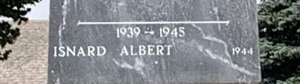 Monument aux morts de Saint-André-d'Embrun.